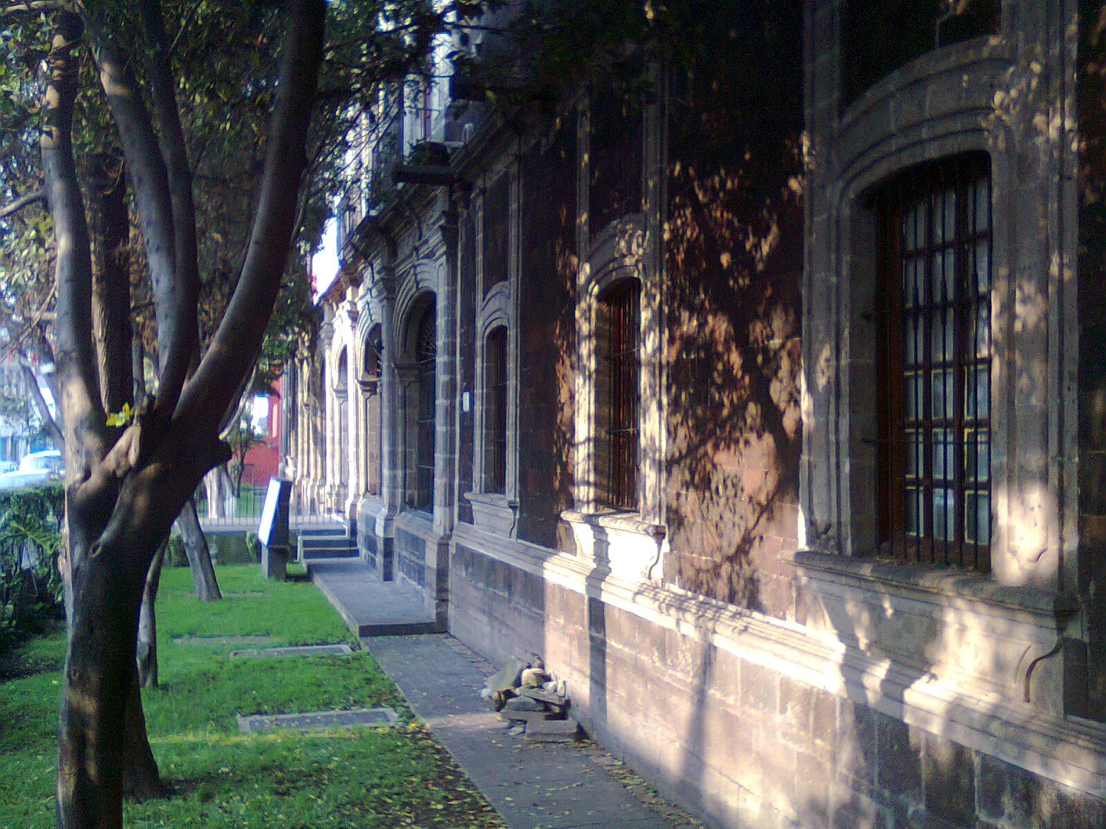 Para nosotros es un lugar muy especial, la entrada a la Basilica de Guadalupe, justo donde comienzan las Calzadas de los Misterios y de Guadalupe donde pasan los peregrinos. Por siempre ha sido una entrada de mercancías a la ciudad y todos tenían que parar el la garita para pagar sus impuestos; hasta que benito Juárez los abolió.